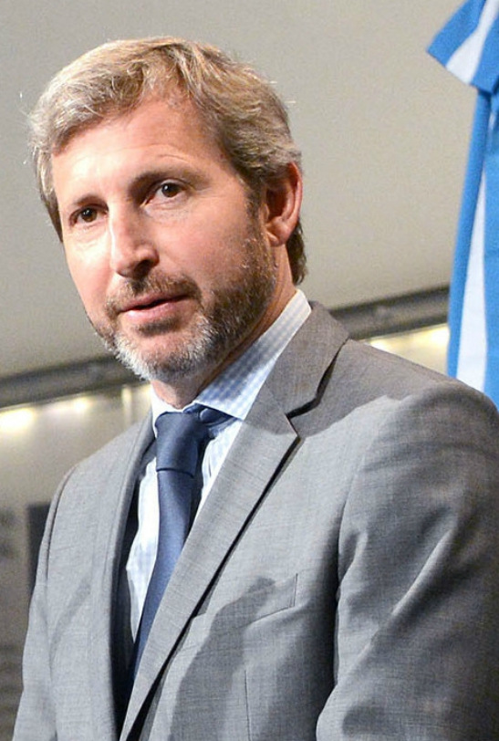 Ministro del Interior, Rogelio Frigerio.